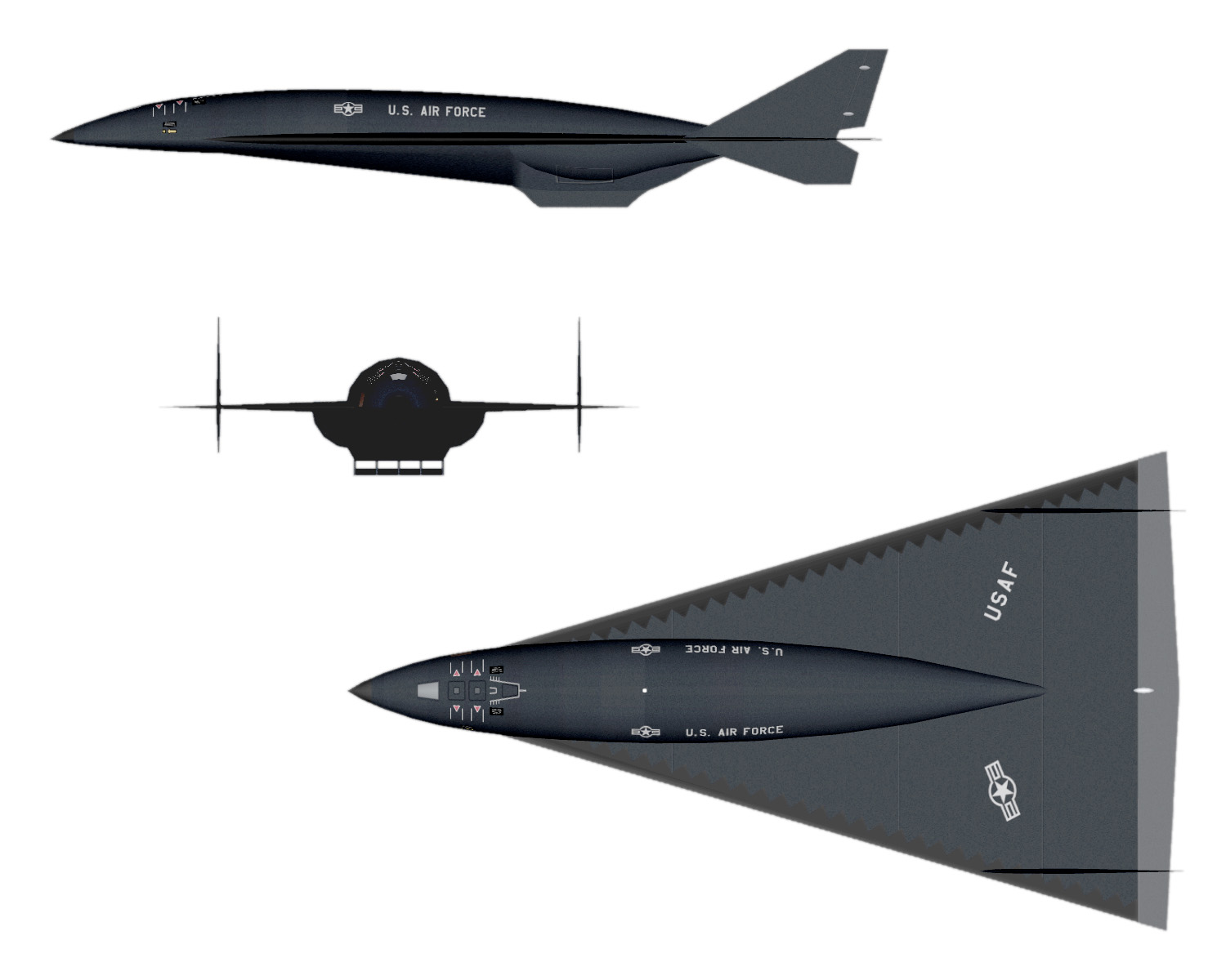 Aurora 3-view.